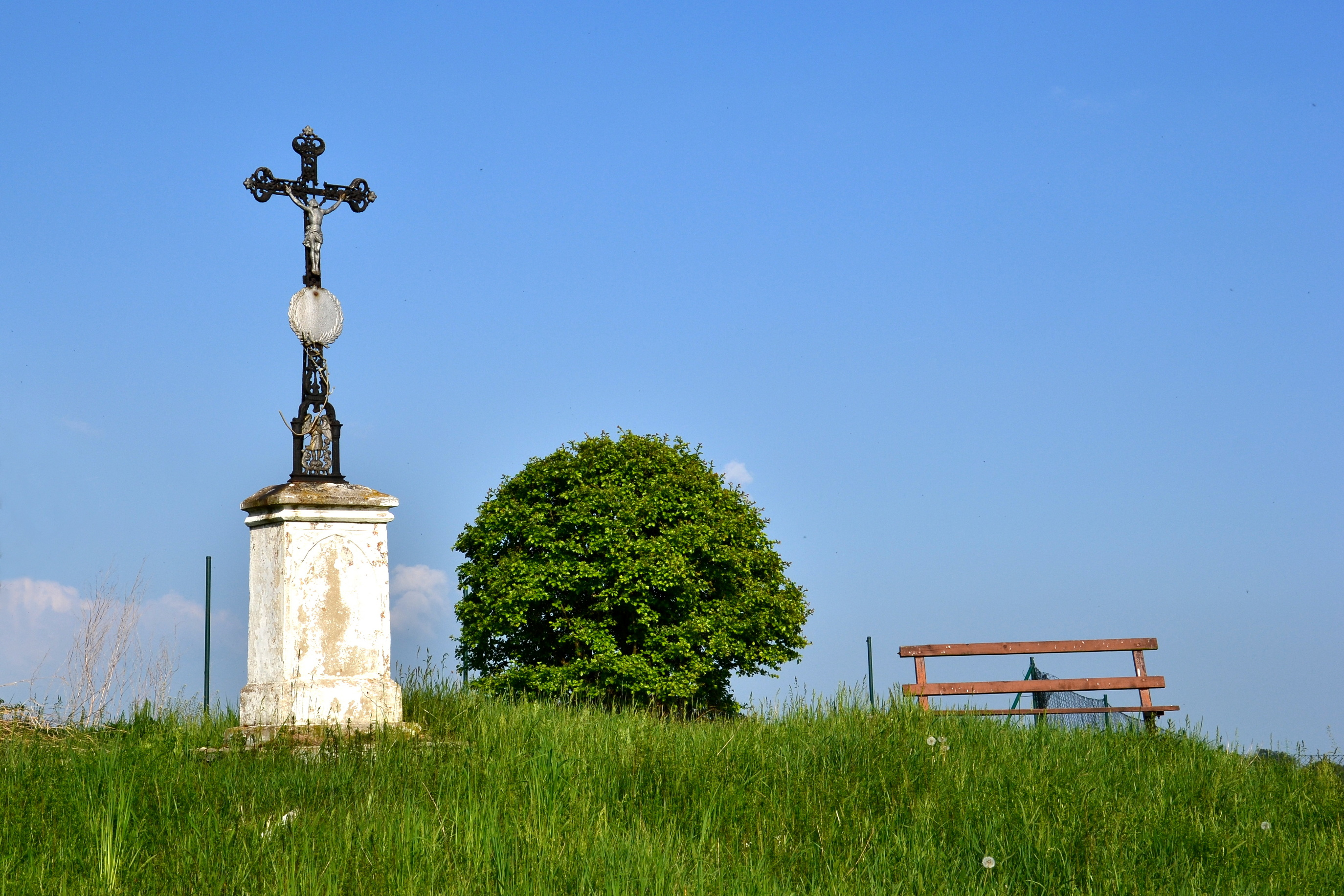 Kříž na západním okraji vesnice